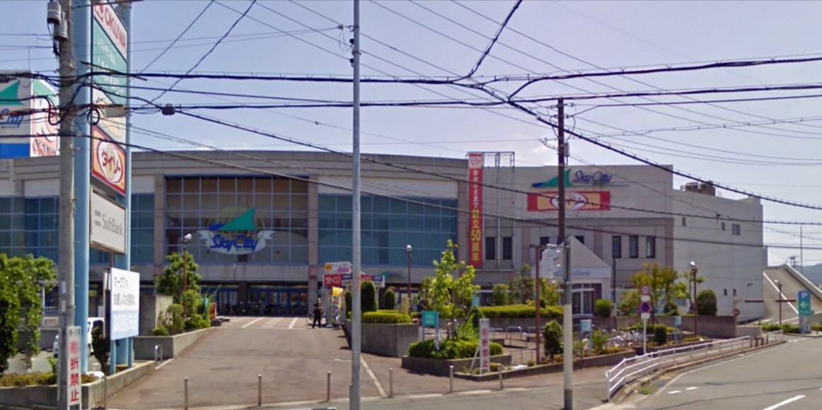 大阪府泉南市にあったオークワの核店舗